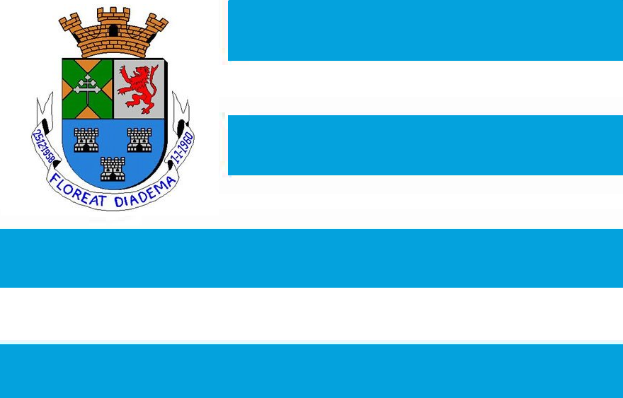 Bandeira de Diadema, São Paulo, Brasil